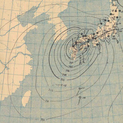 1945年9月17日（月）のアジア太平洋地上天気図